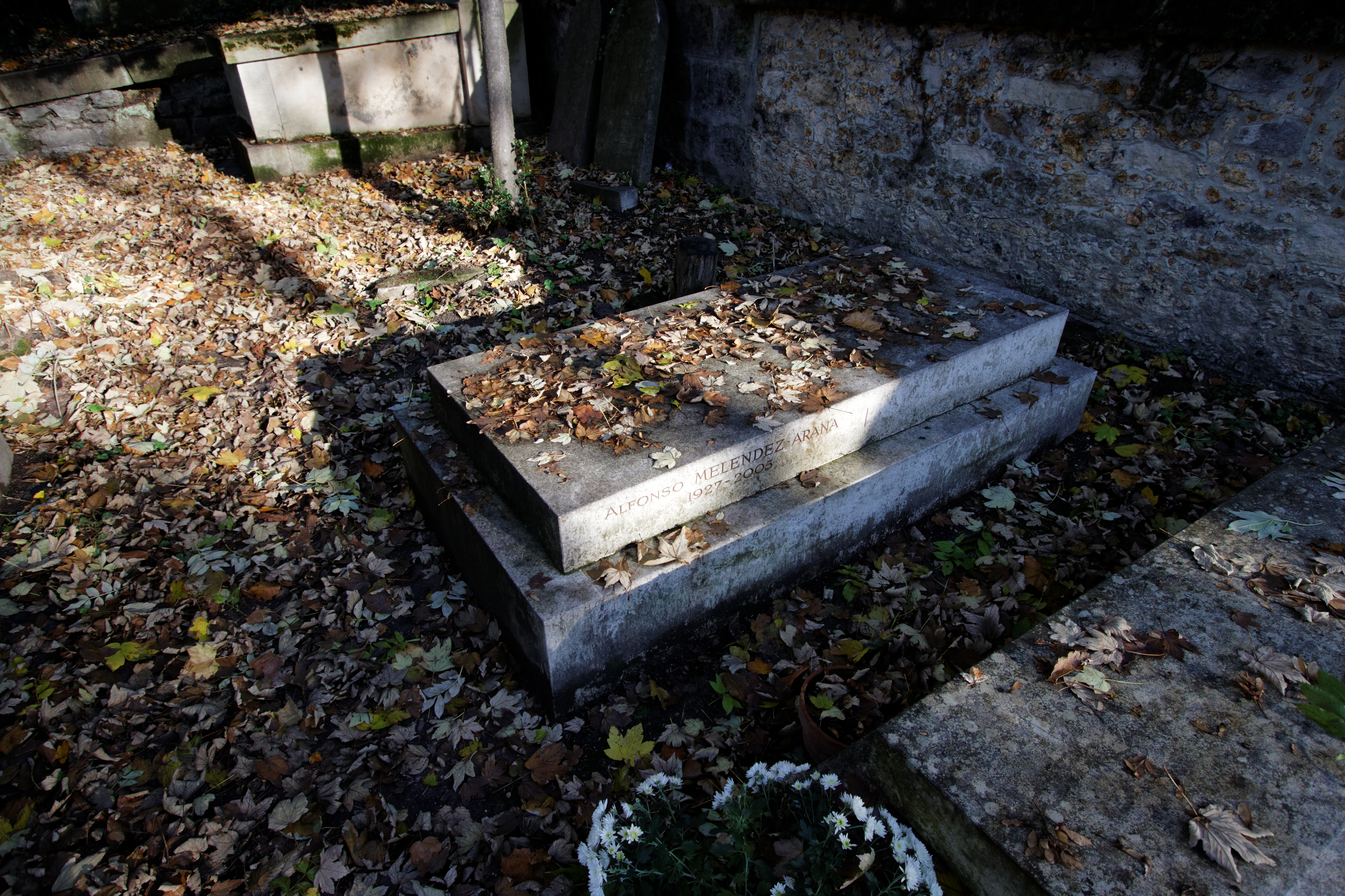 Sépulture d'Alfonso Arana (1927-2005), peintre porto-américain.